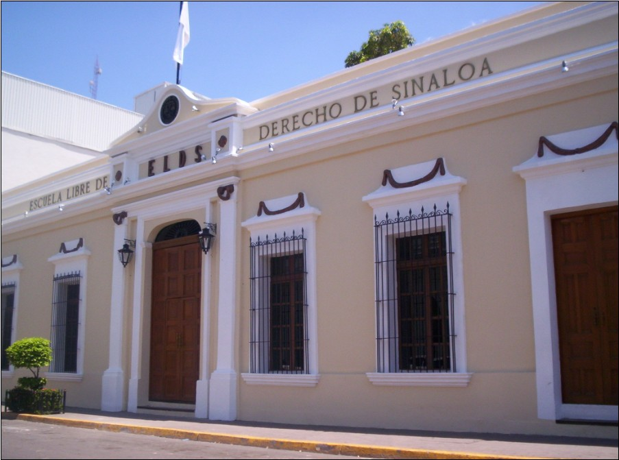 Escuela Libre de Derecho de Sinaloa Culiacán, Sinaloa, México Author: MightyKC